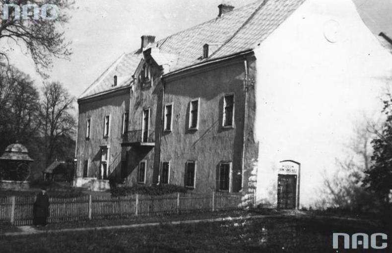 Zamek Królewski w Sanoku. Fotografia z lat 1918-1939